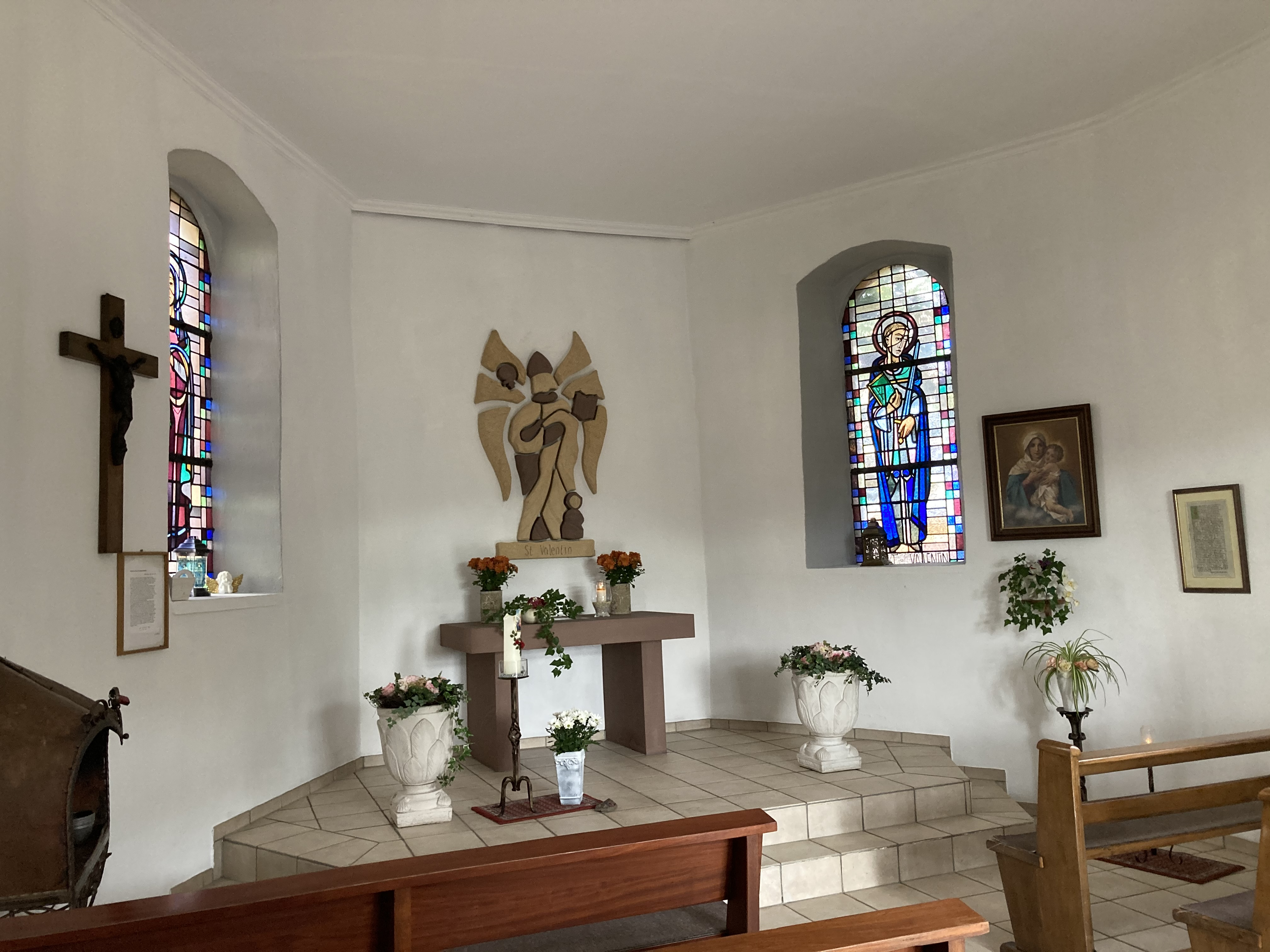 Innenansicht mit Altar und Relief